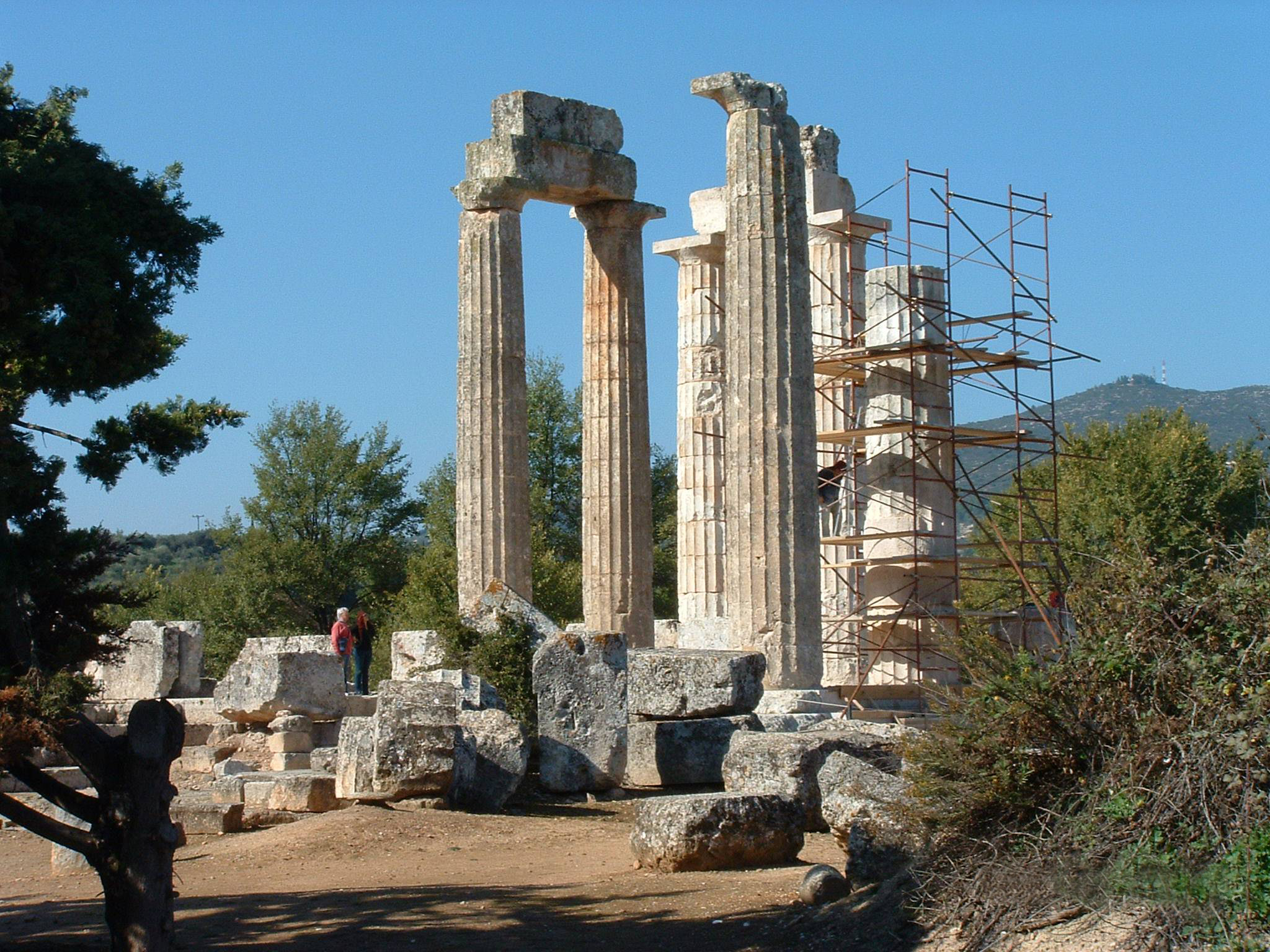 04/11/2005 Categorie:Afbeelding oudheid